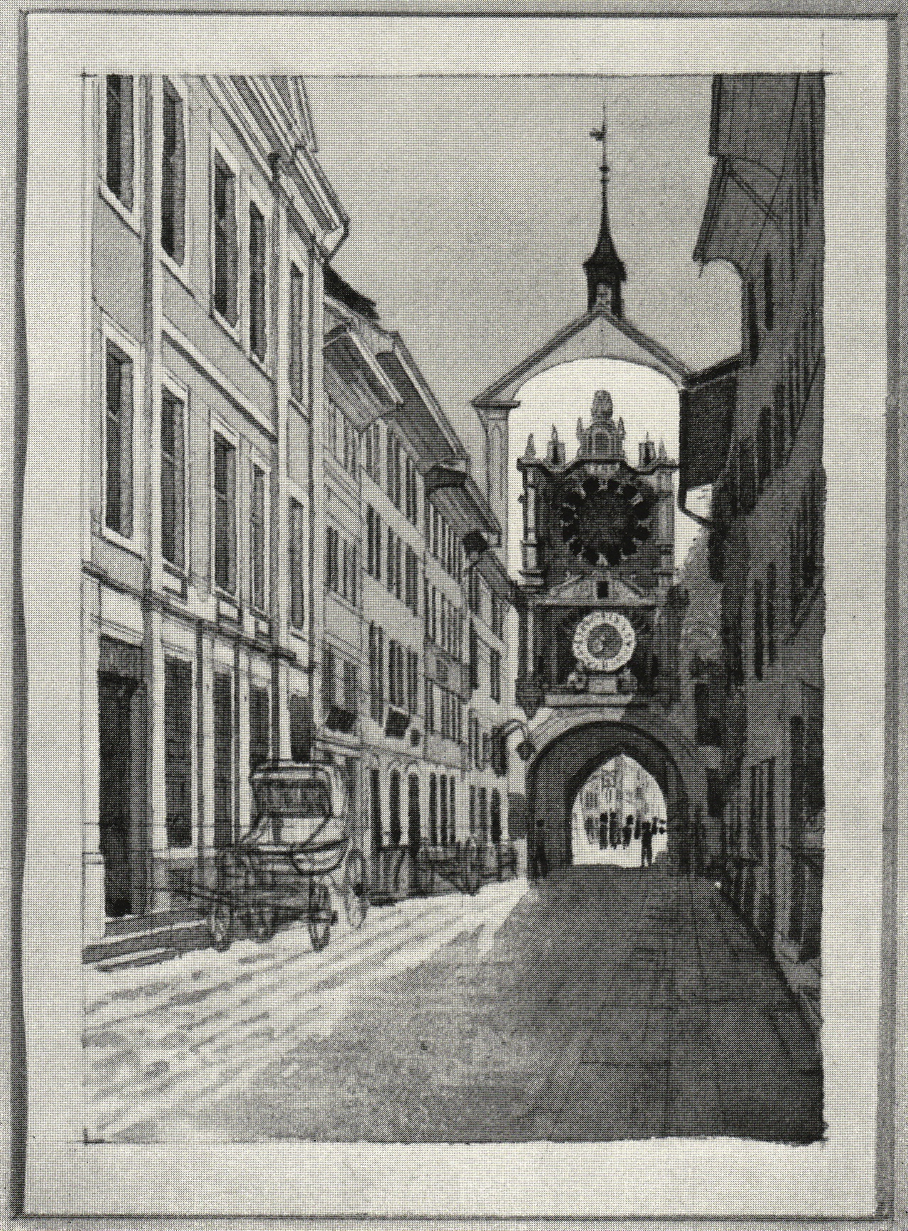 Blick westwärts durch die Winterthurer Marktgass auf den Untern Bogen mit dem Zeitglockenturm (Zeichnung).